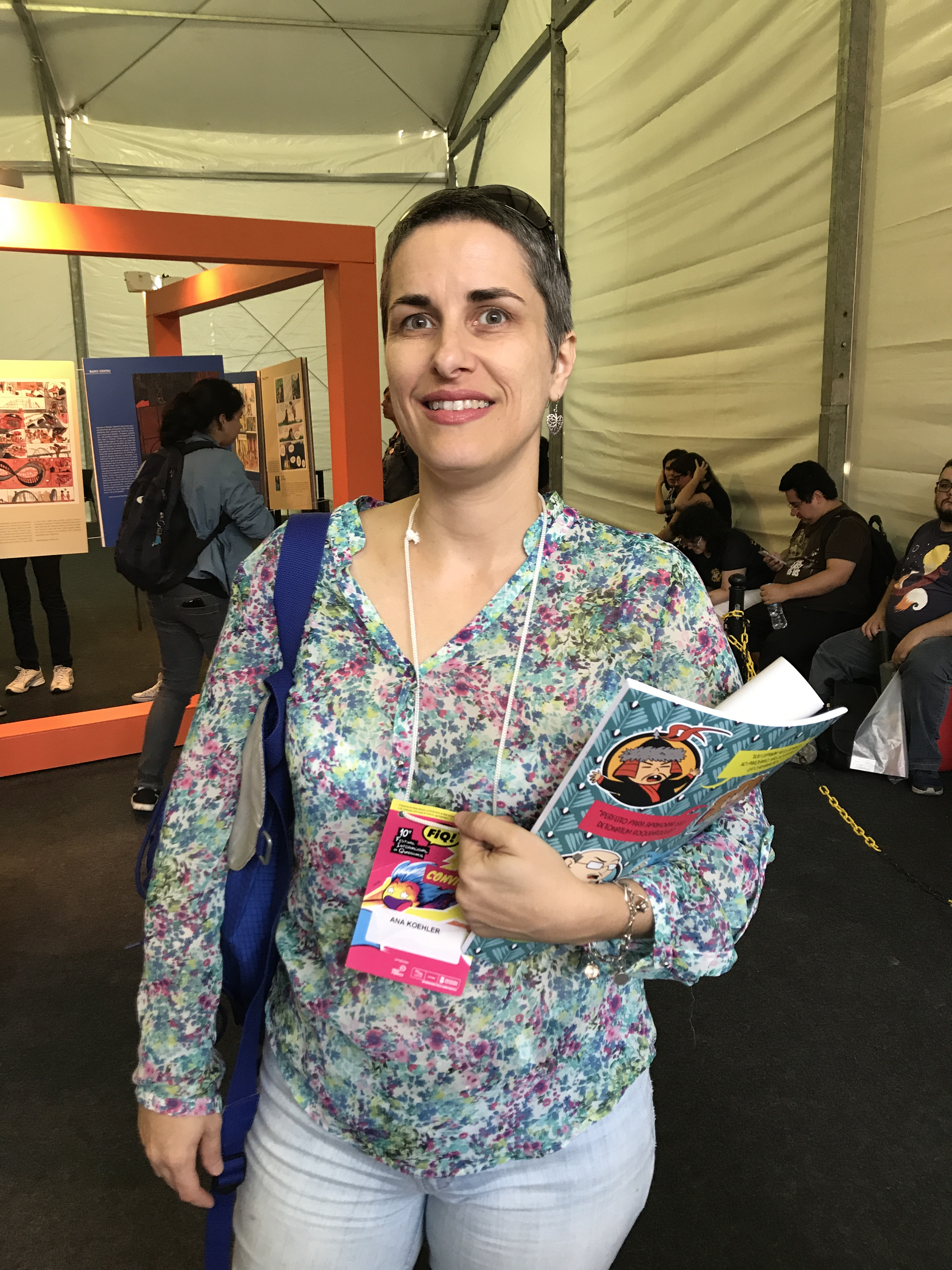 Artista Ana Luiza Koehler na edição de 2018 do Festival Internacional de Quadrinhos.